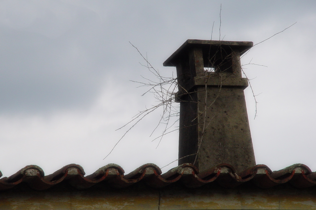 Restos da antiga estação de caminhos de Ferro de Gondifelos - Vila Nova de Famalicão, Portugal